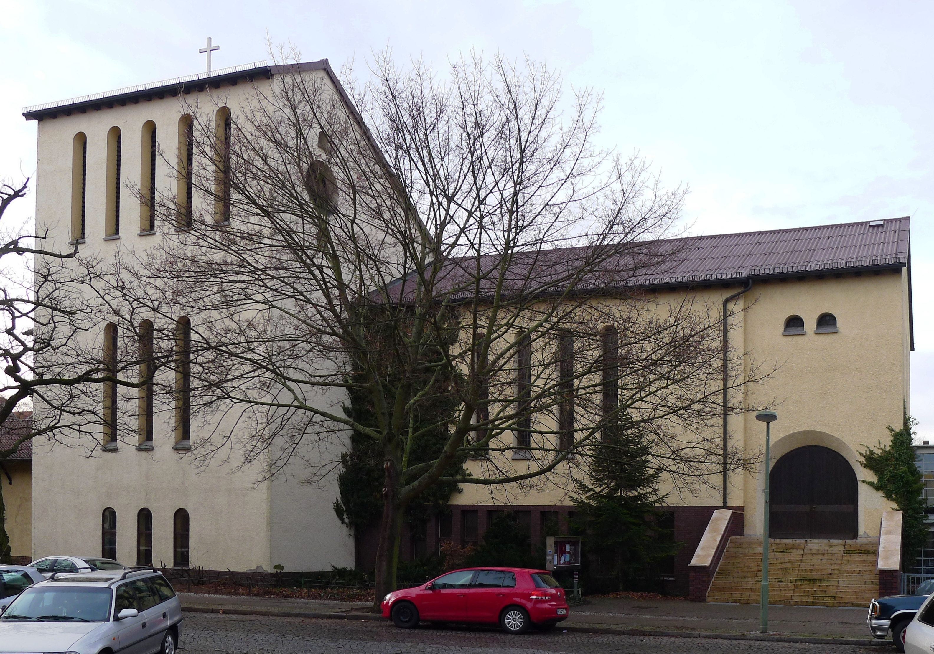 Gesamtansicht der Kirche